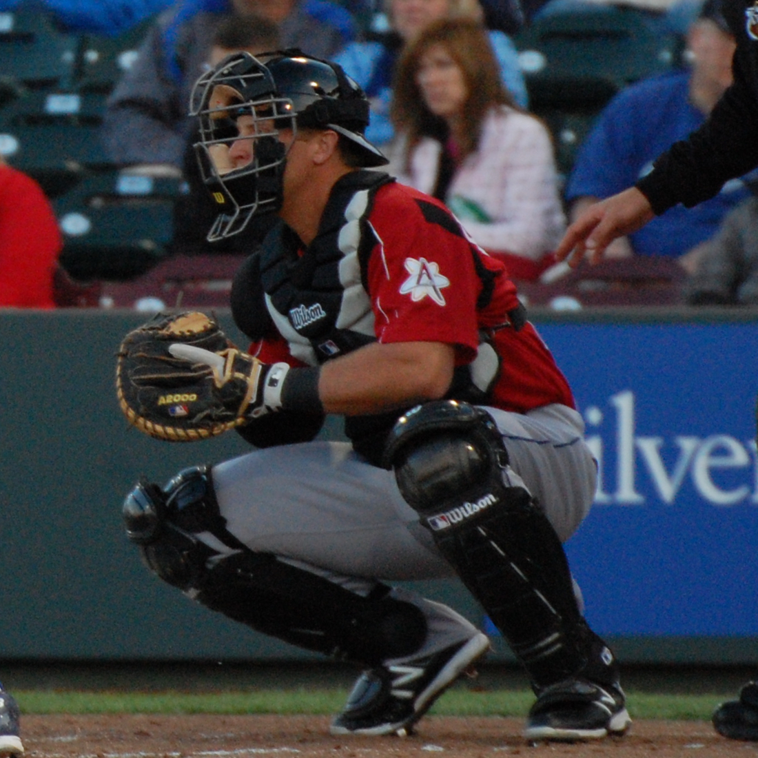 Tim Federowicz